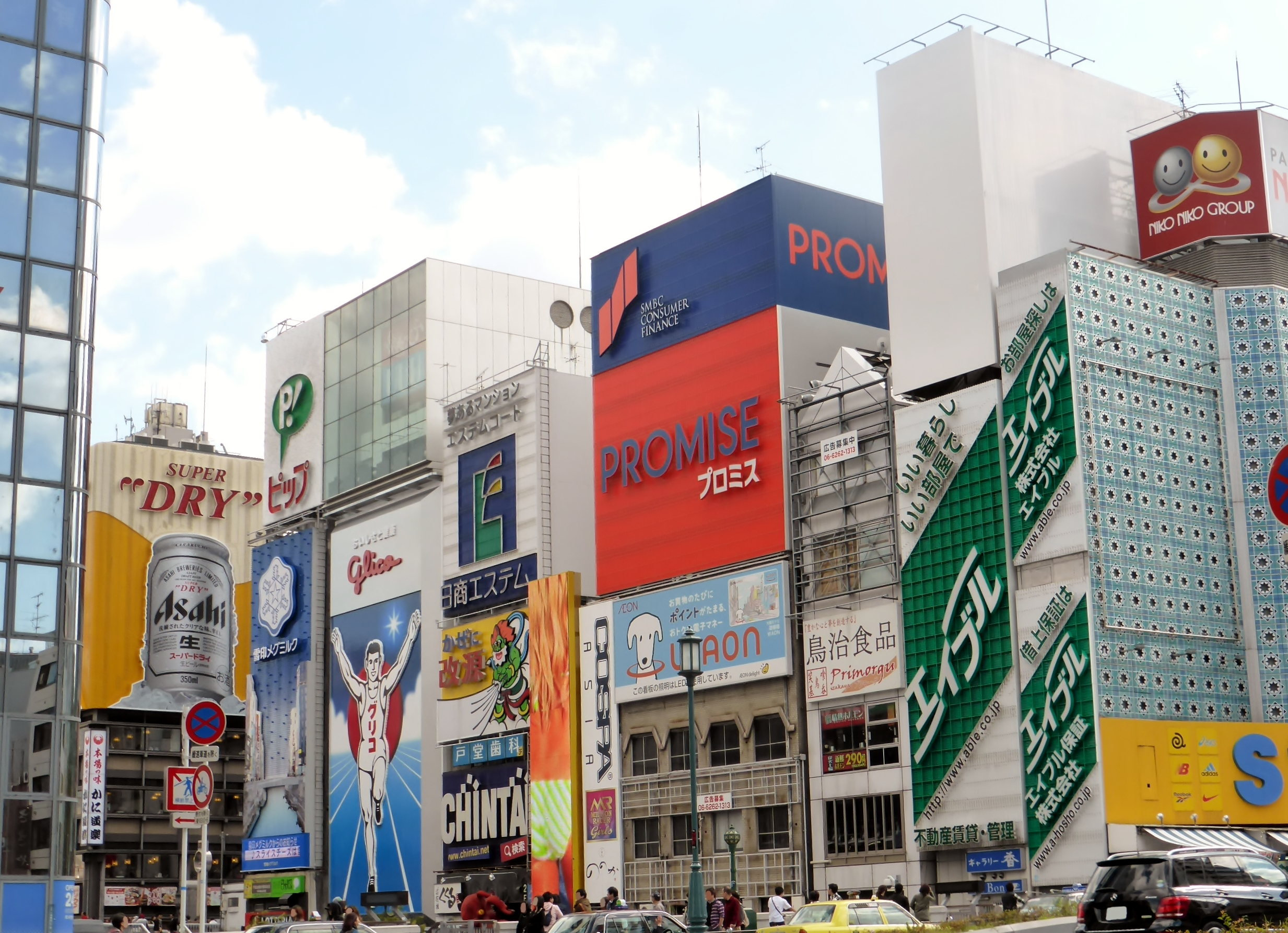 2014年11月3日時点の道頓堀のネオンサイン群を撮影。